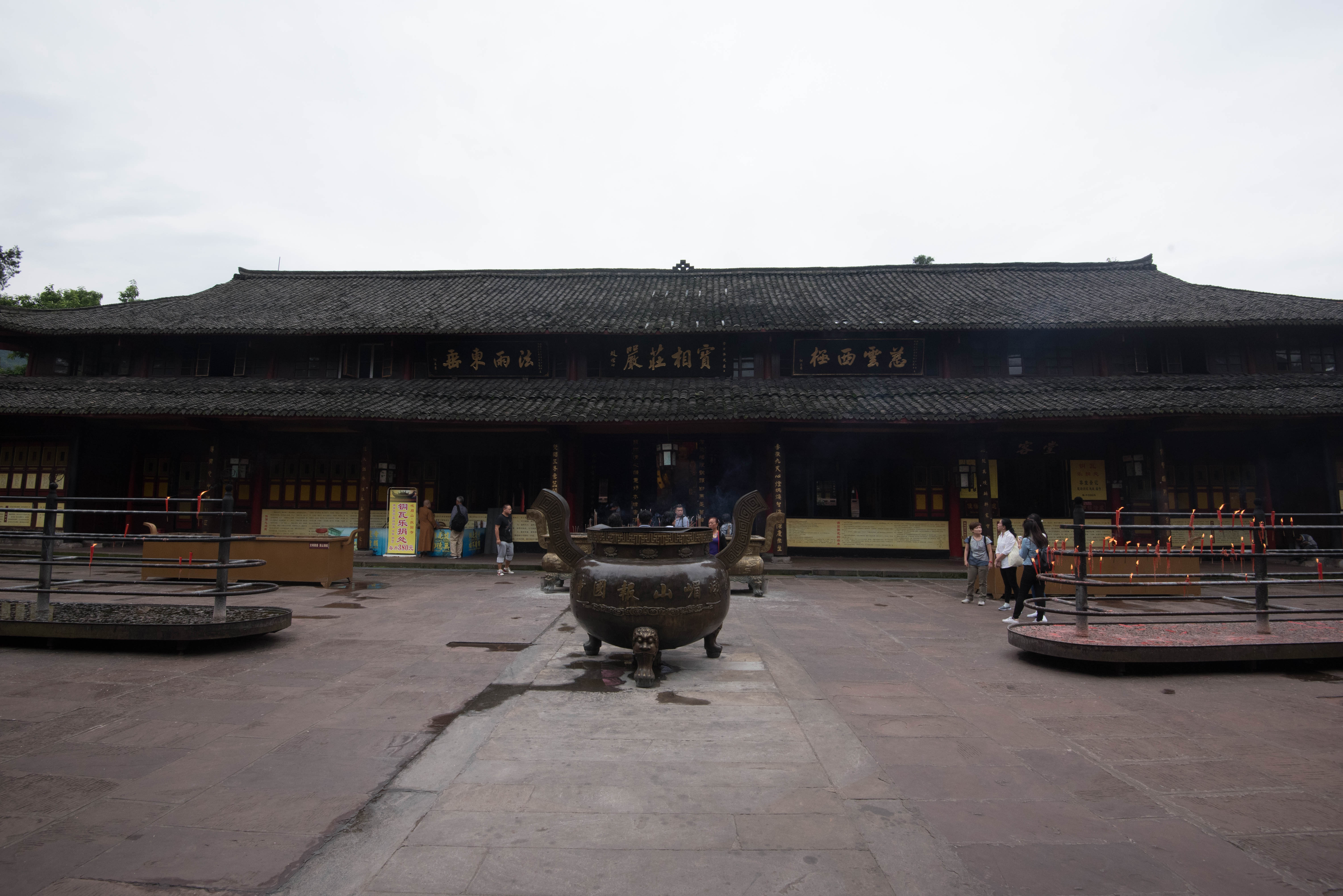 峨眉山报国寺